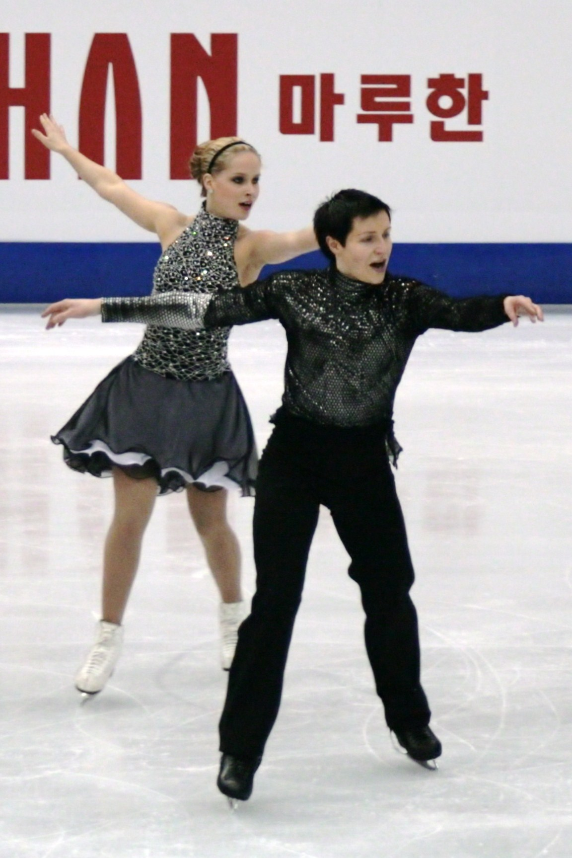 Хенна Линдхолм и Осси Канерво (Финляндия) на чемпионате мира по фигурному катанию 2012, предварительный раунд.